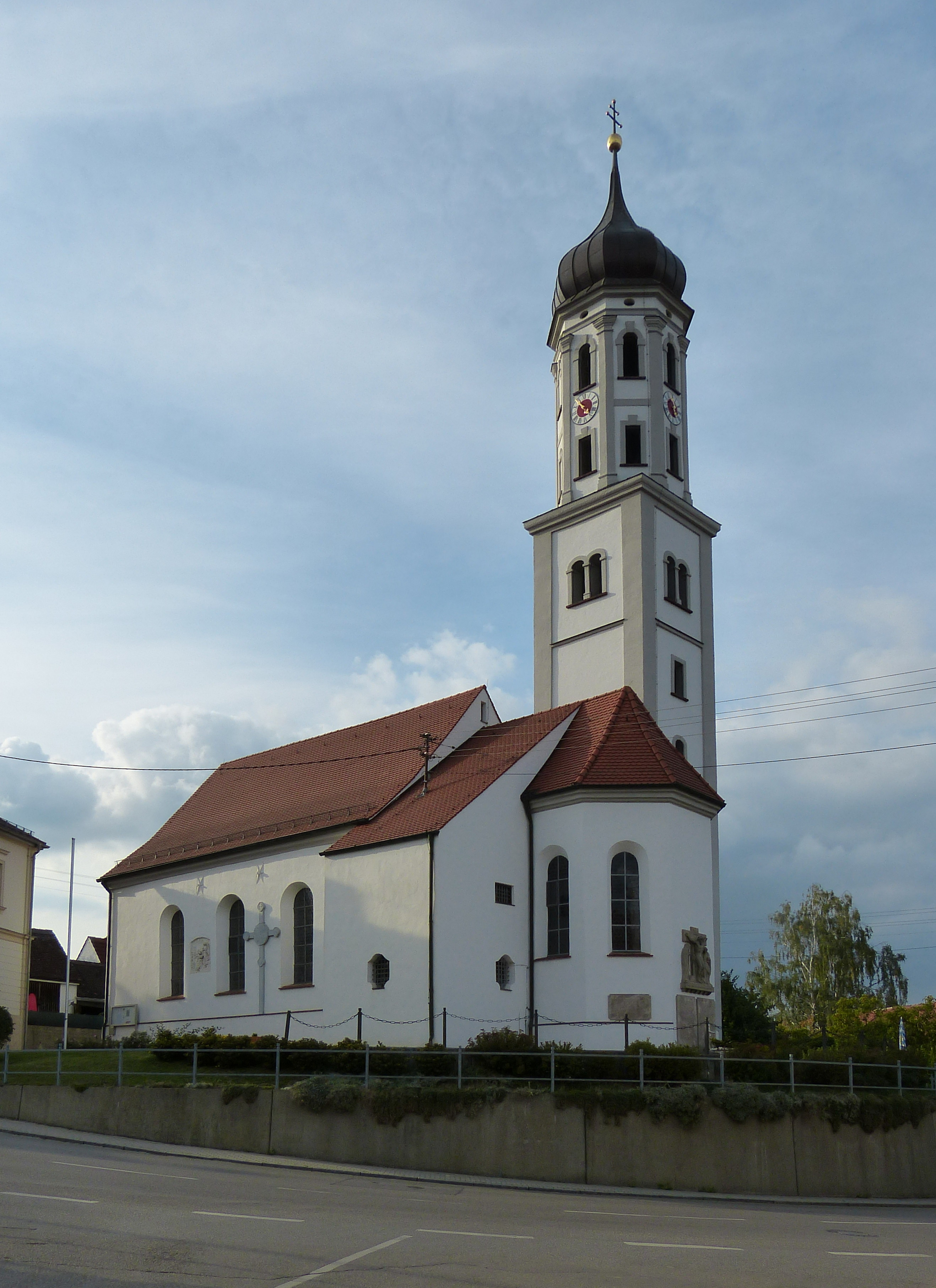 Kirche Mariä Himmelfahrt in Täfertingen (Neusäß)This is a photograph of an architectural monument.